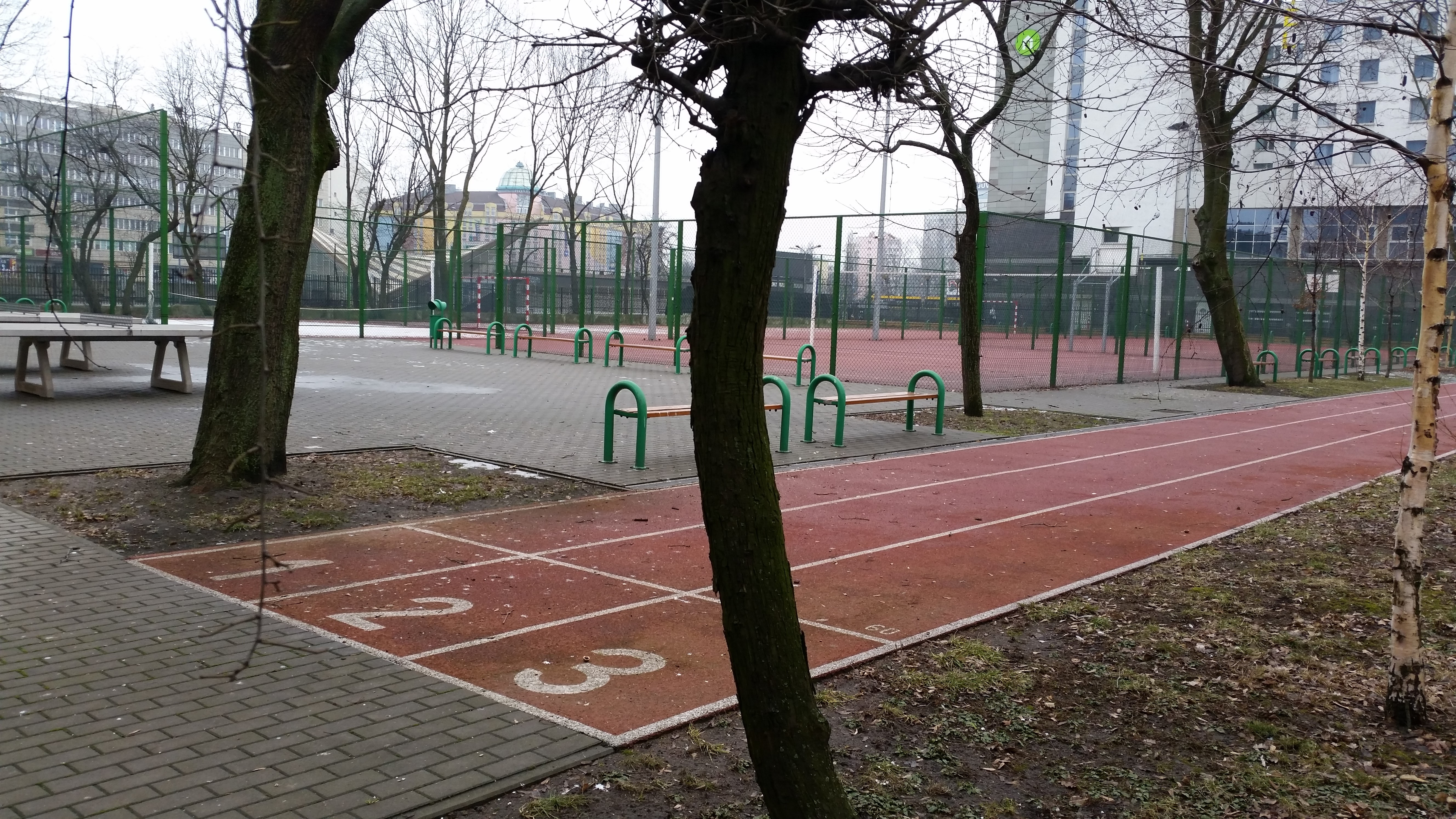 XL Liceum Ogólnokształcące z Oddziałami Dwujęzycznymi im. Stefana Żeromskiego w Warszawie – boisko szkolne